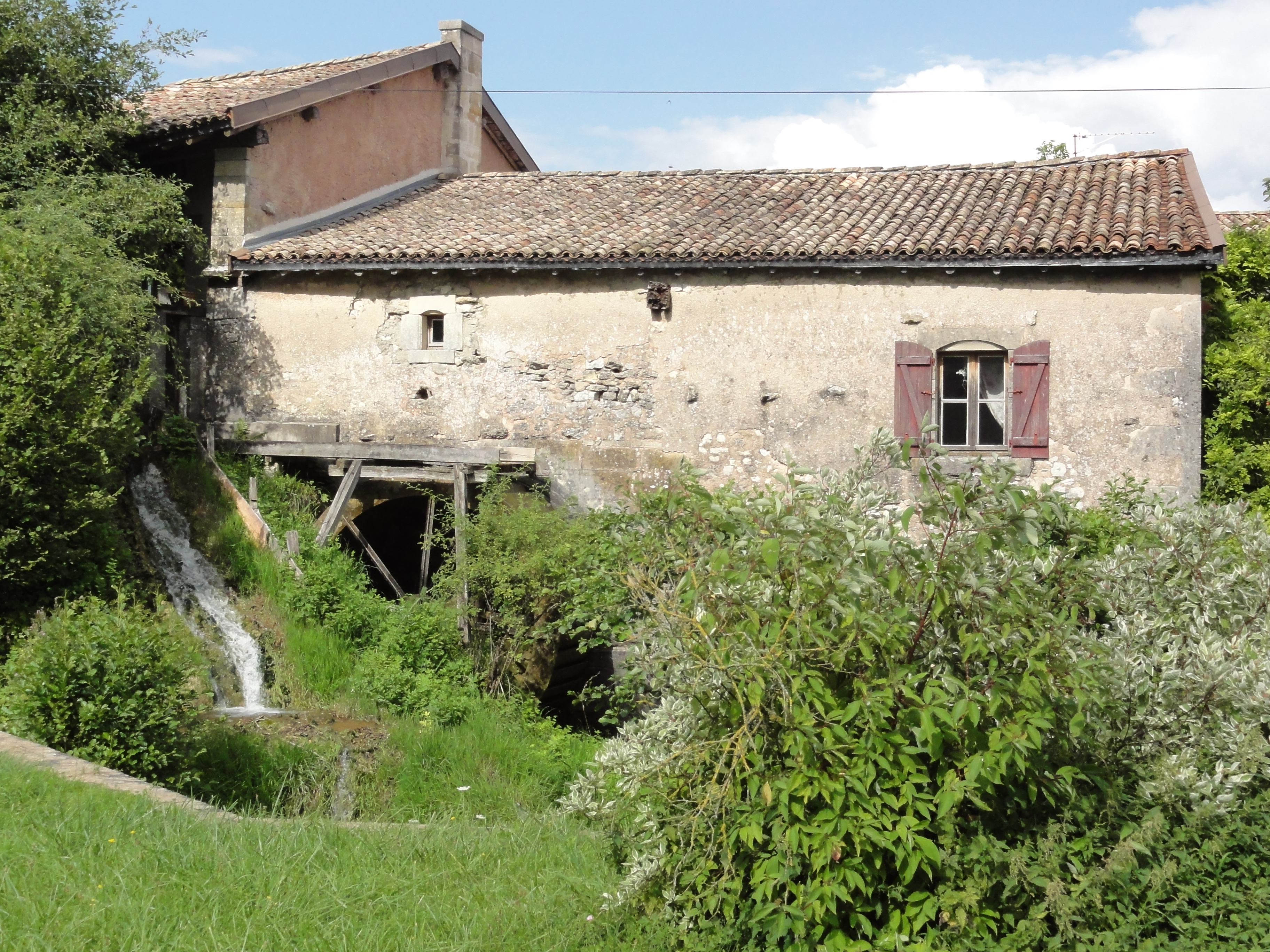 Culey (Meuse) moulin à eau